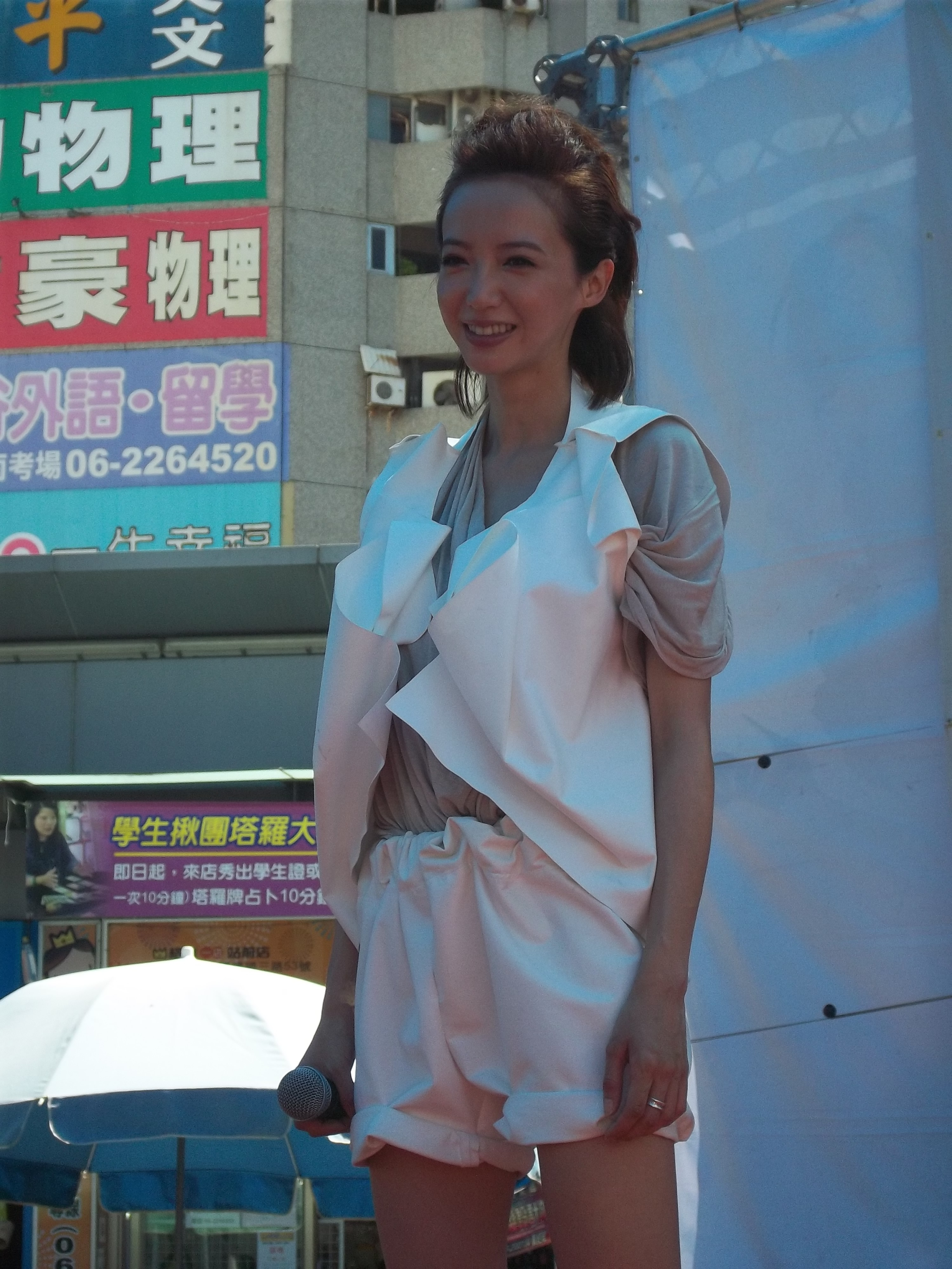 Linda廖語晴在台南南方公園的《愛。現》簽唱會